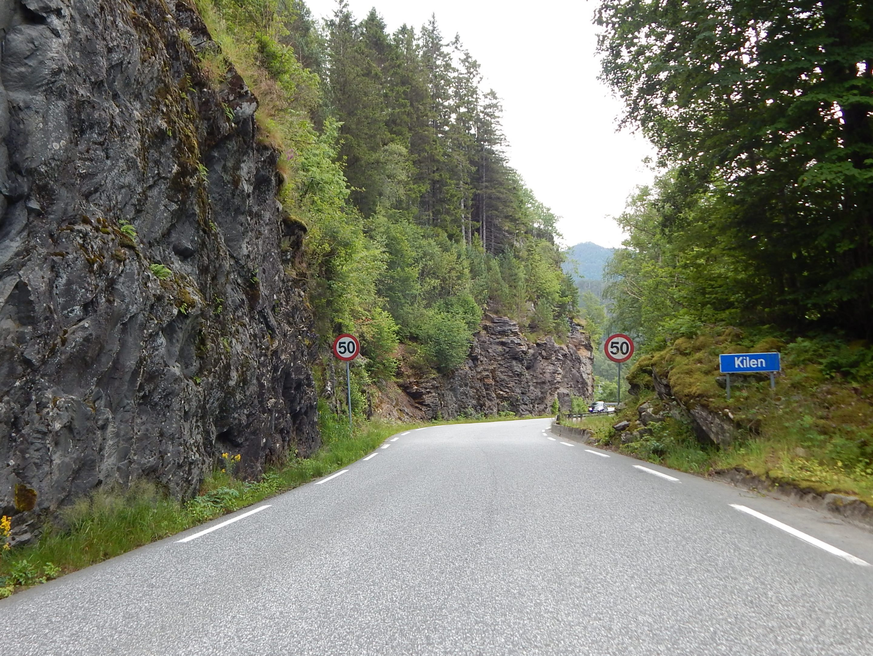 Fylkesvei 48 ved Kilen i Fusa